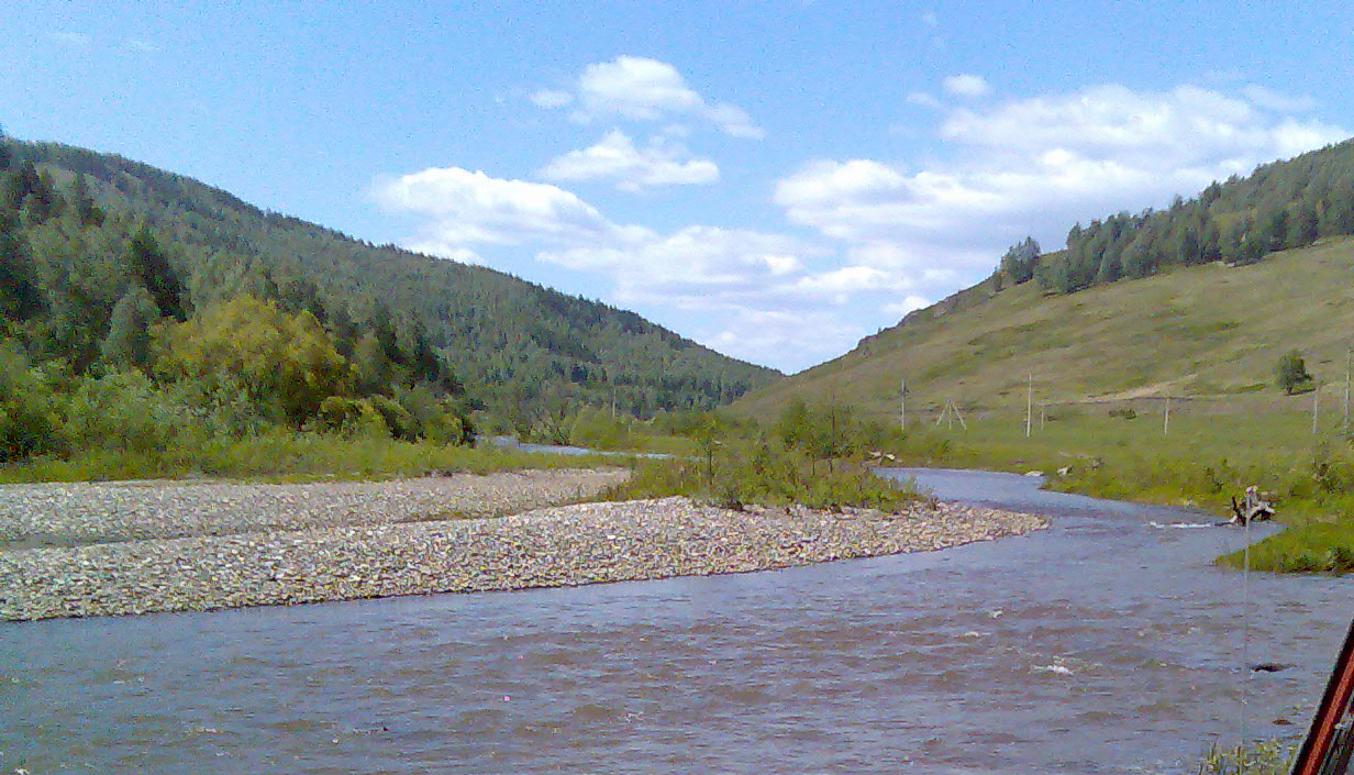 Река Большой Кизил